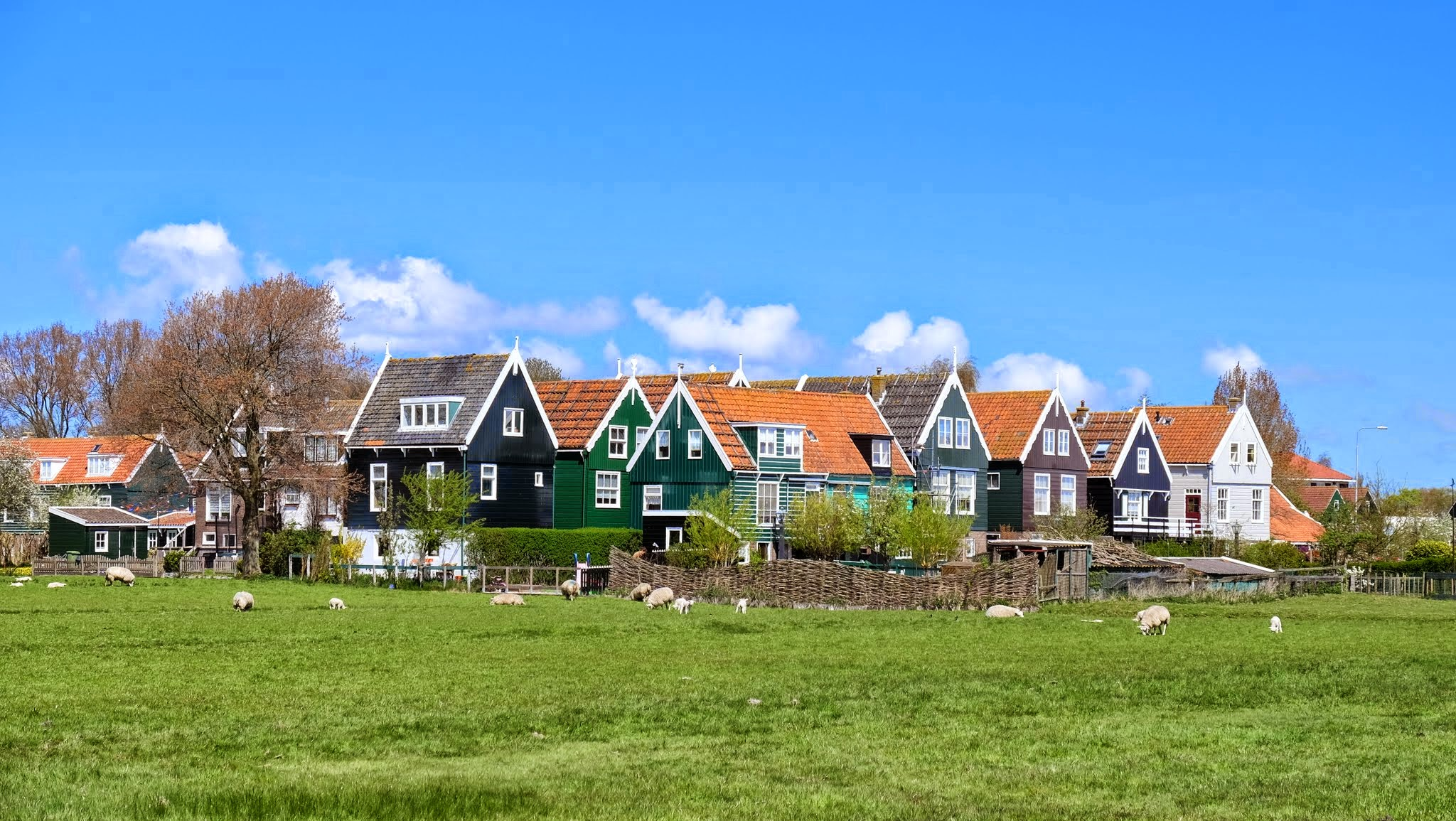 1156 Marken, Netherlands